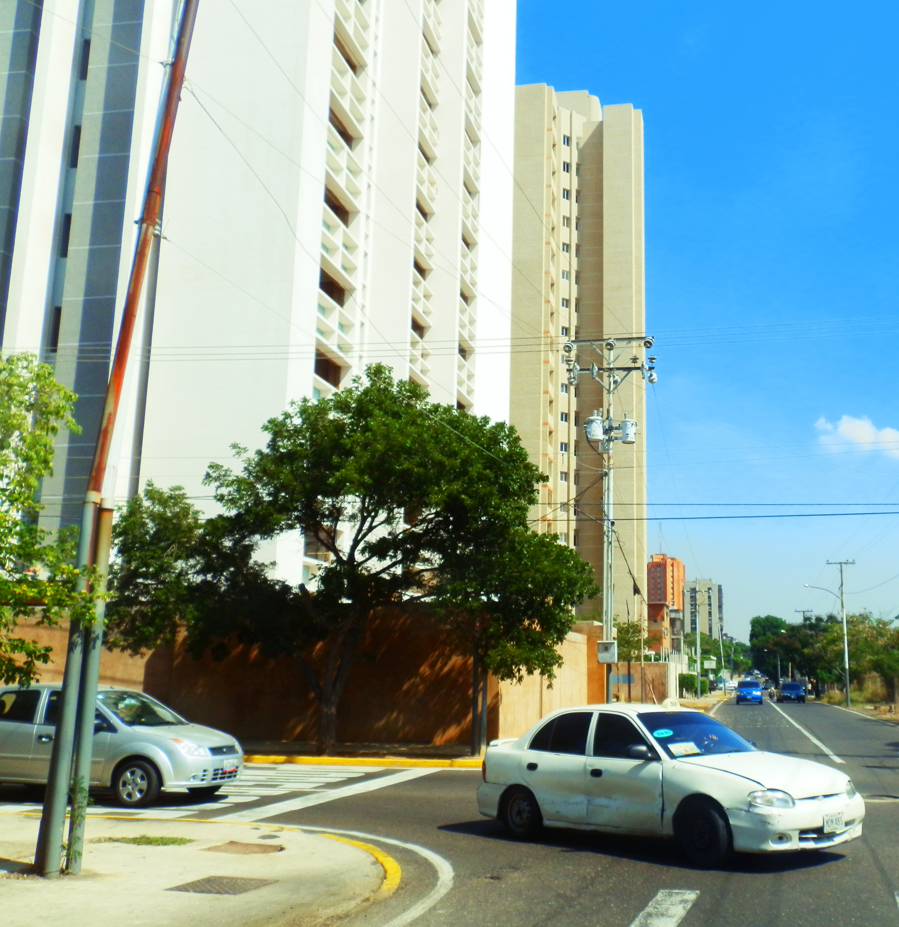 Un taxi en Maracaibo, Venezuela, los autos llevan vidrios ahumados por el fuerte impacto del sol en Maracaibo.